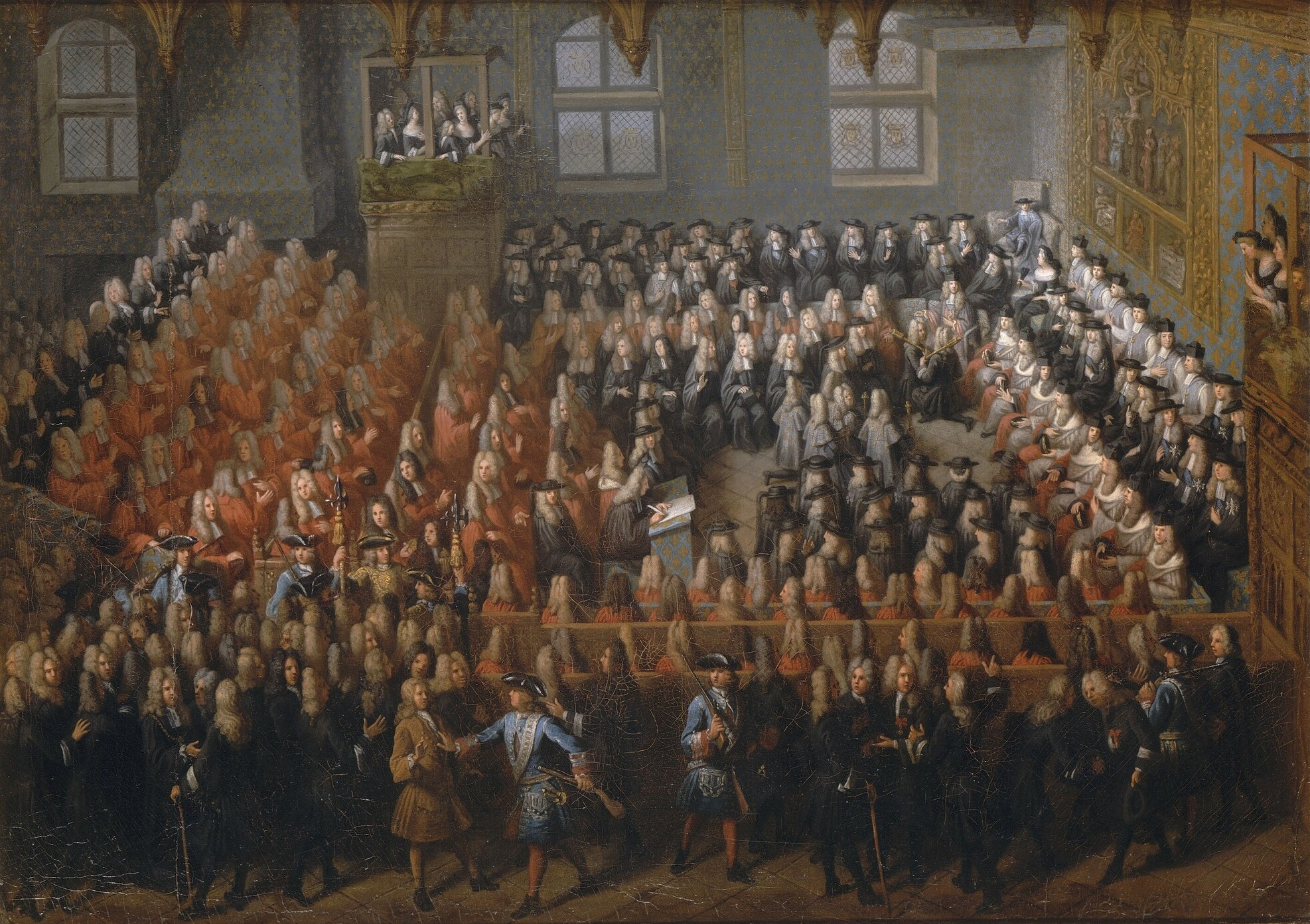 Le lit de justice du 12 septembre 1715, en présence du jeune Louis XV qui confirme la régence pour Philippe d'Orléans. (Roi visible au fond à droit sous un dais). Séance tenue dans la Grande Chambre du Parlement de Paris. Dimensions : 76,5 x 107,5 cm. Cadre: 90,5 x 120,5 x 7 cm. Matière et technique : huile sur toile